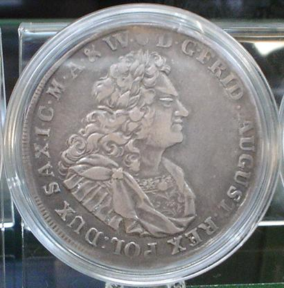 Talar Augusta II Mocnego, 1713, Drezno